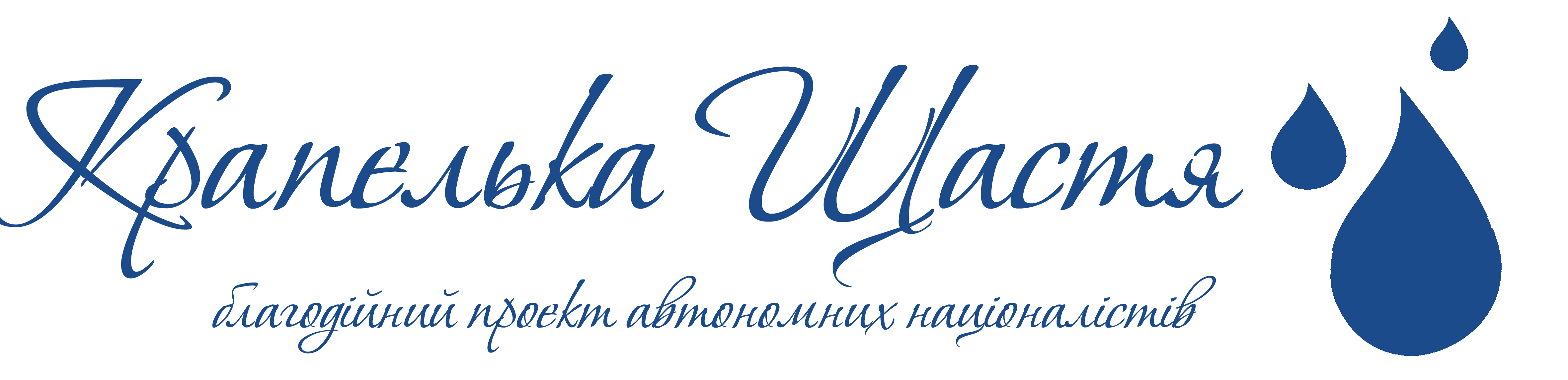 Емблема благодійного проекту Автономних націоналістів України "Крапелька Щастя".